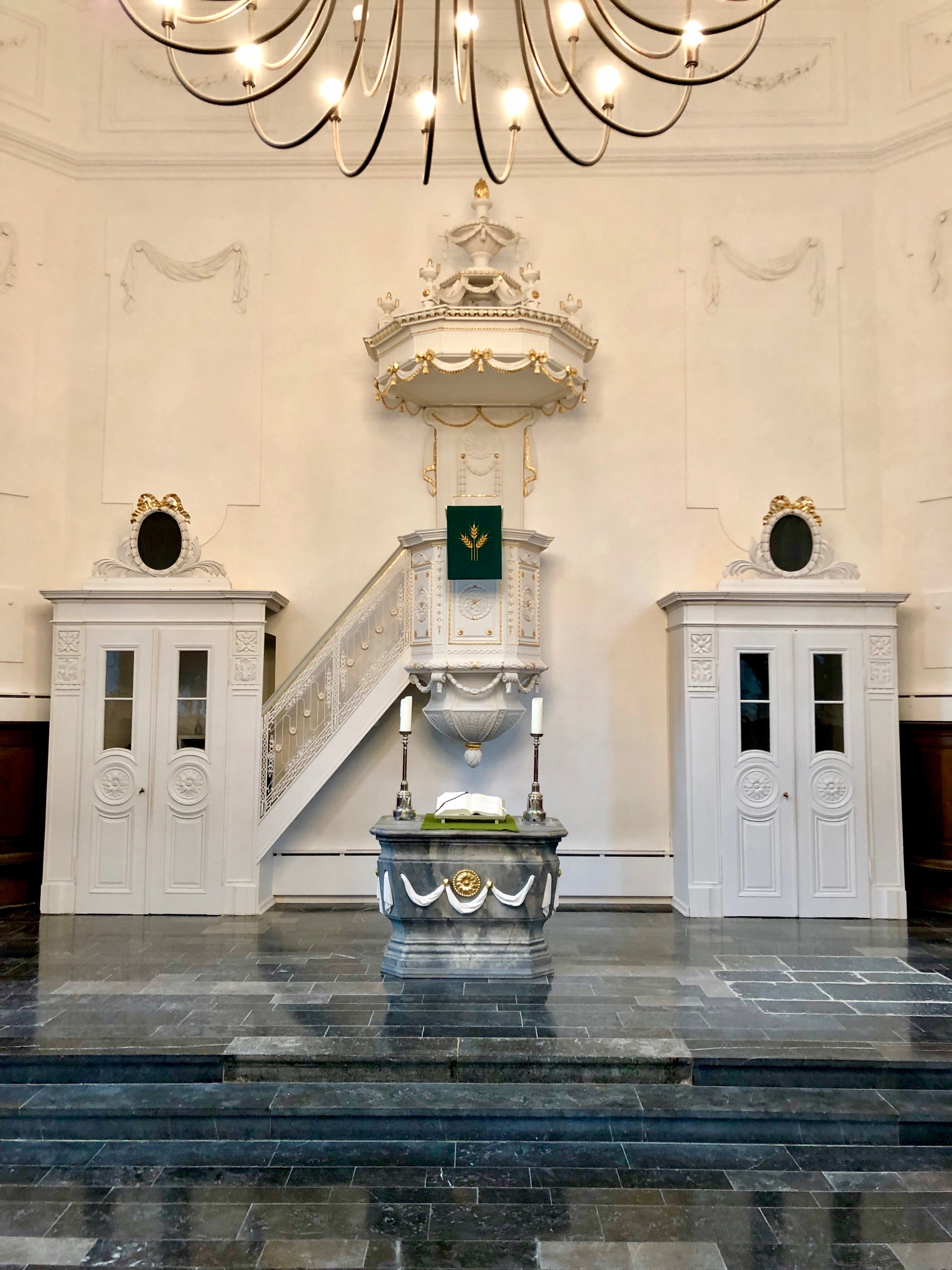 Prinzipalwand mit Kanzelaltar von 1789 (Stand Januar 2019)